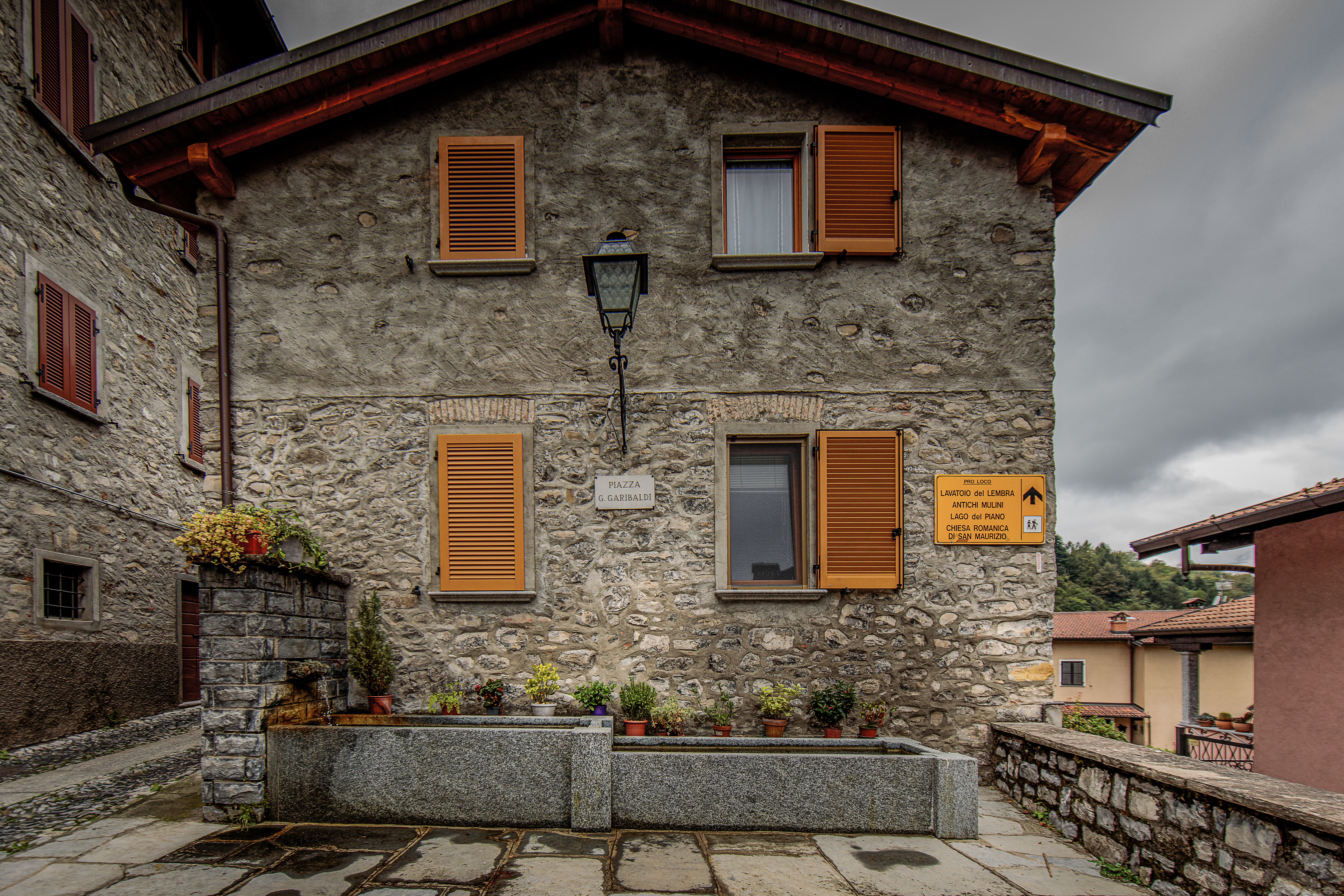 Cimitero comunale This is a photo of a monument which is part of cultural heritage of Italy.